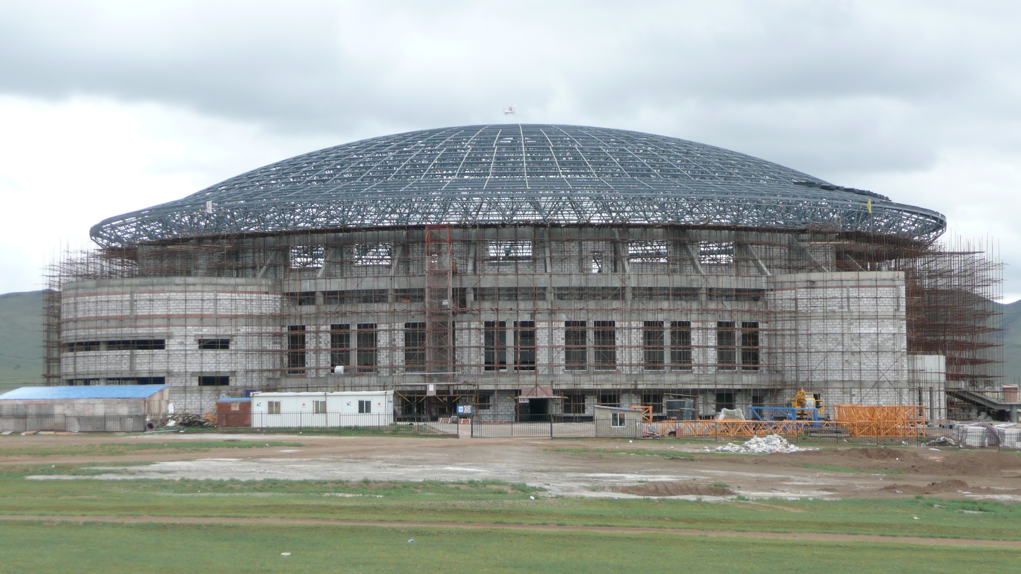 Sportstadion am Flughafen von Ulan Bator